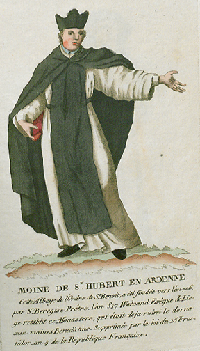 Collection de costumes de tous les ordres monastiques, supprimés à differentes époques, dans la ci-devant Belgique, Bruxelles, Philippe Joseph Maillart et sœur, 1811